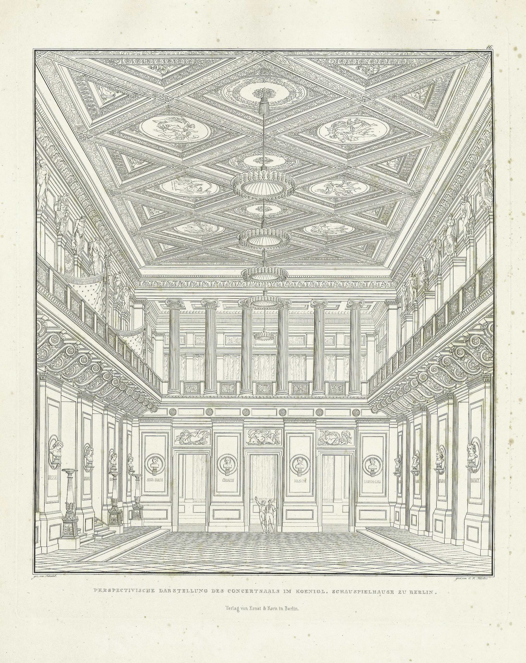 Schauspielhaus Berlin, Innenraumperspektive des Konzertsaals